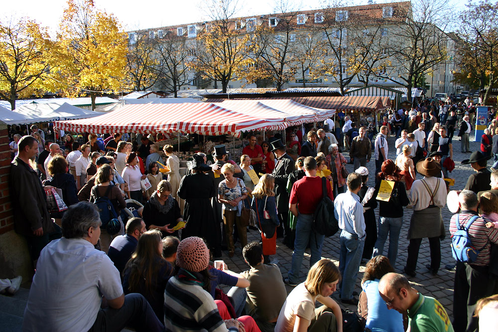 Auer Dult